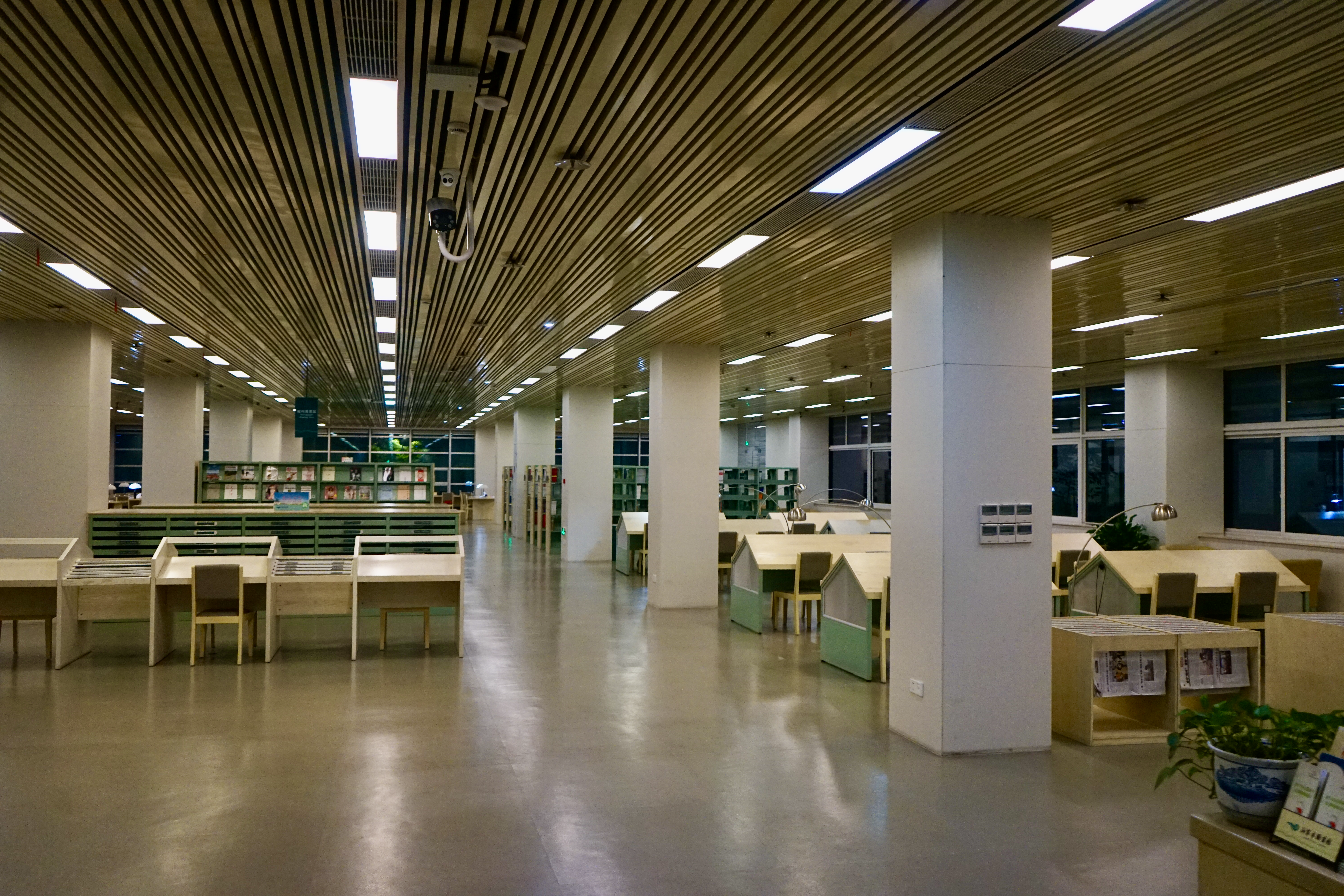 中文（中国大陆）: 海宁图书馆